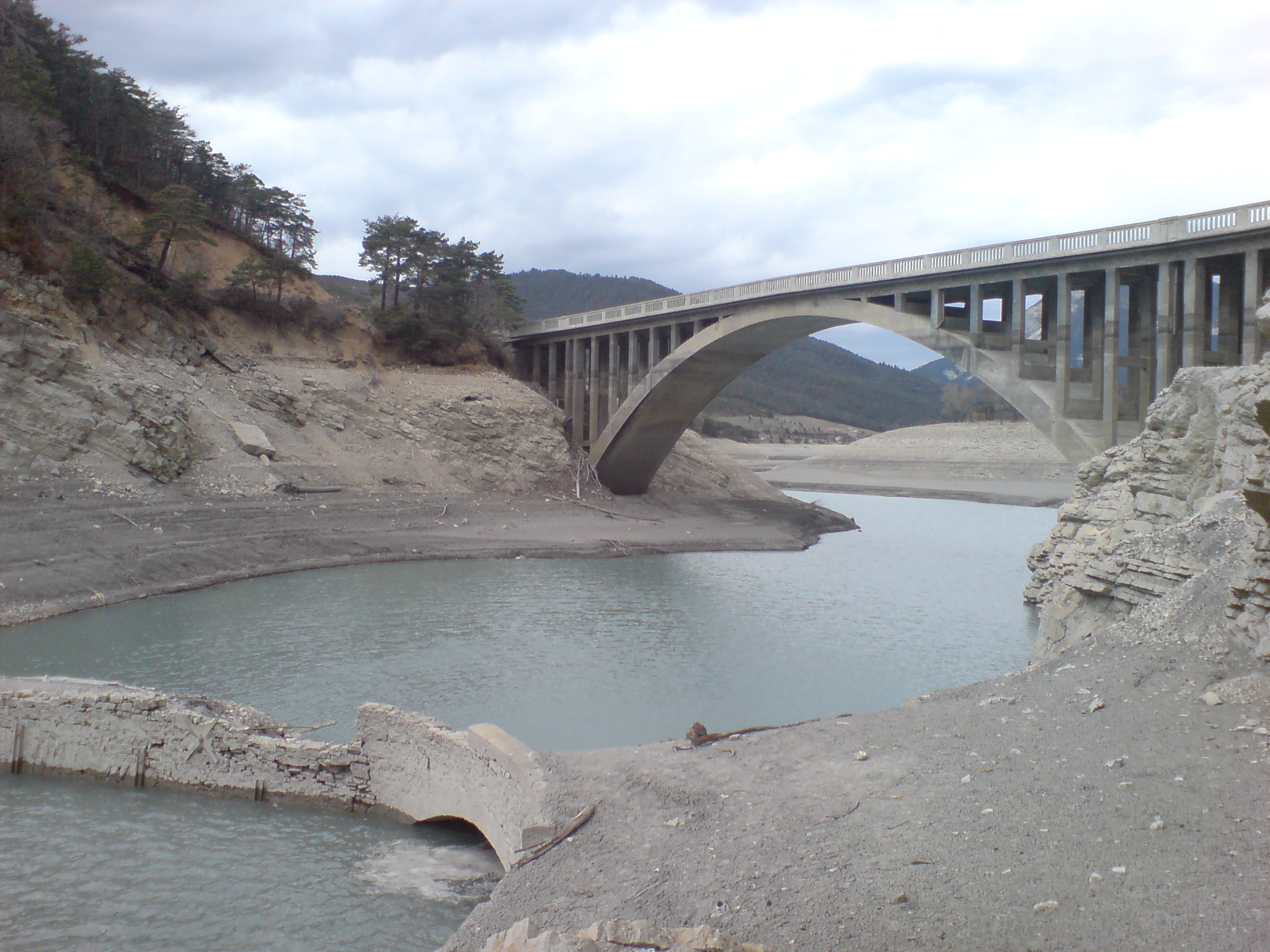 Information Le vieux pont Julien, submergé, et le pont Julien moderne, commune de Saint-André-les-Alpes, sur le Verdon (rivière) Alpes-de-Haute-Provence) Date : voir métadonnées